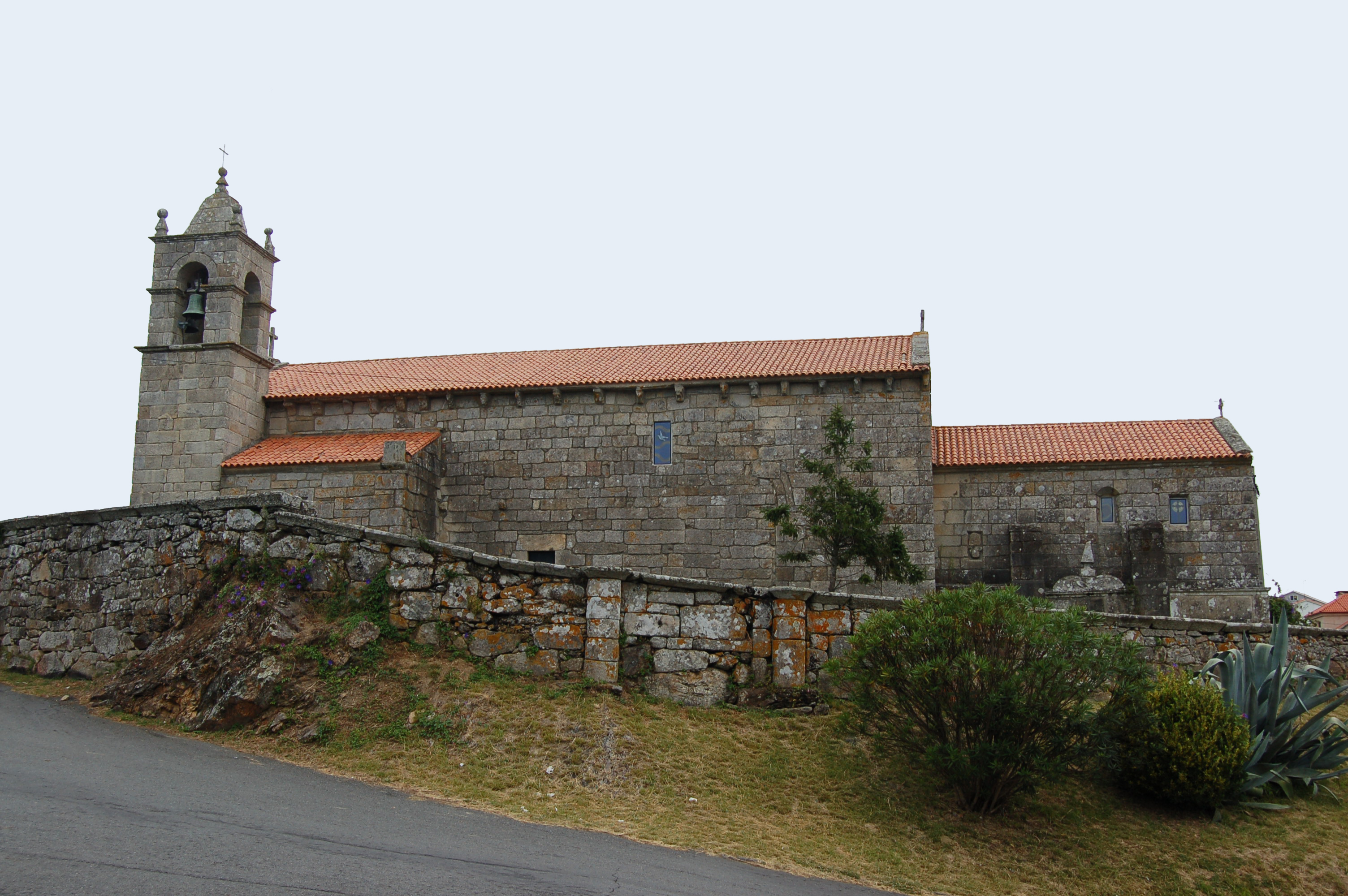 Iglesia parroquial de Adina, en Sanxenxo, Galicia.